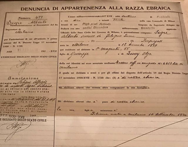 Denuncia di appartenenza alla razza ebraica (20 ottobre 1939) di Alberto Segre